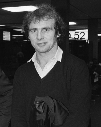 Hölzenbein in Nederland voor de wedstrijd tussen Feyenoord en Eintracht Frankfurt